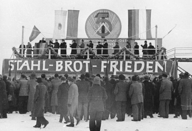 ADN-ZB / Illus- Sturm, 1.1.1951 Grundsteinlegung im Hüttenkombinat Ost-Auftakt zum Fünfjahrplan. Am Neujahrstag 1951 legte Minister Selbmann im Eisenhüttenkombinat, den Schwerpunkt 1 des Fünfjahrplans, den Grundstein zum Hochofen I. UBz: Übersicht während der Grundsteinlegung